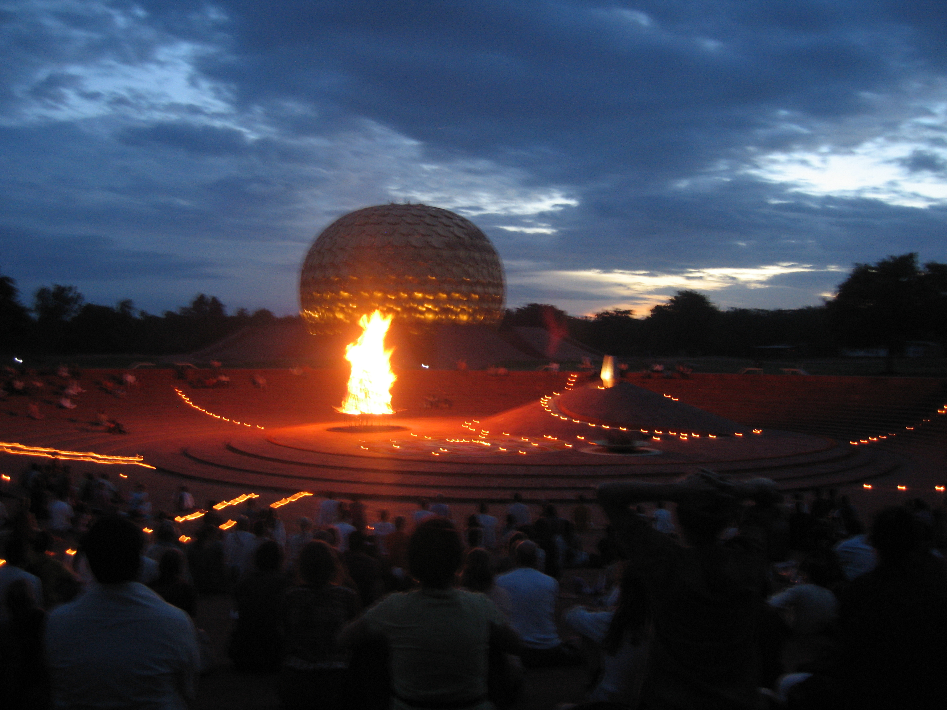 சர்வதேச நகரமான ஆரோவில்லில் நடைபெறும் போர்ன்பைர் என்னும் வேள்வி வழிபாட்டின் அழகிய காட்சி.